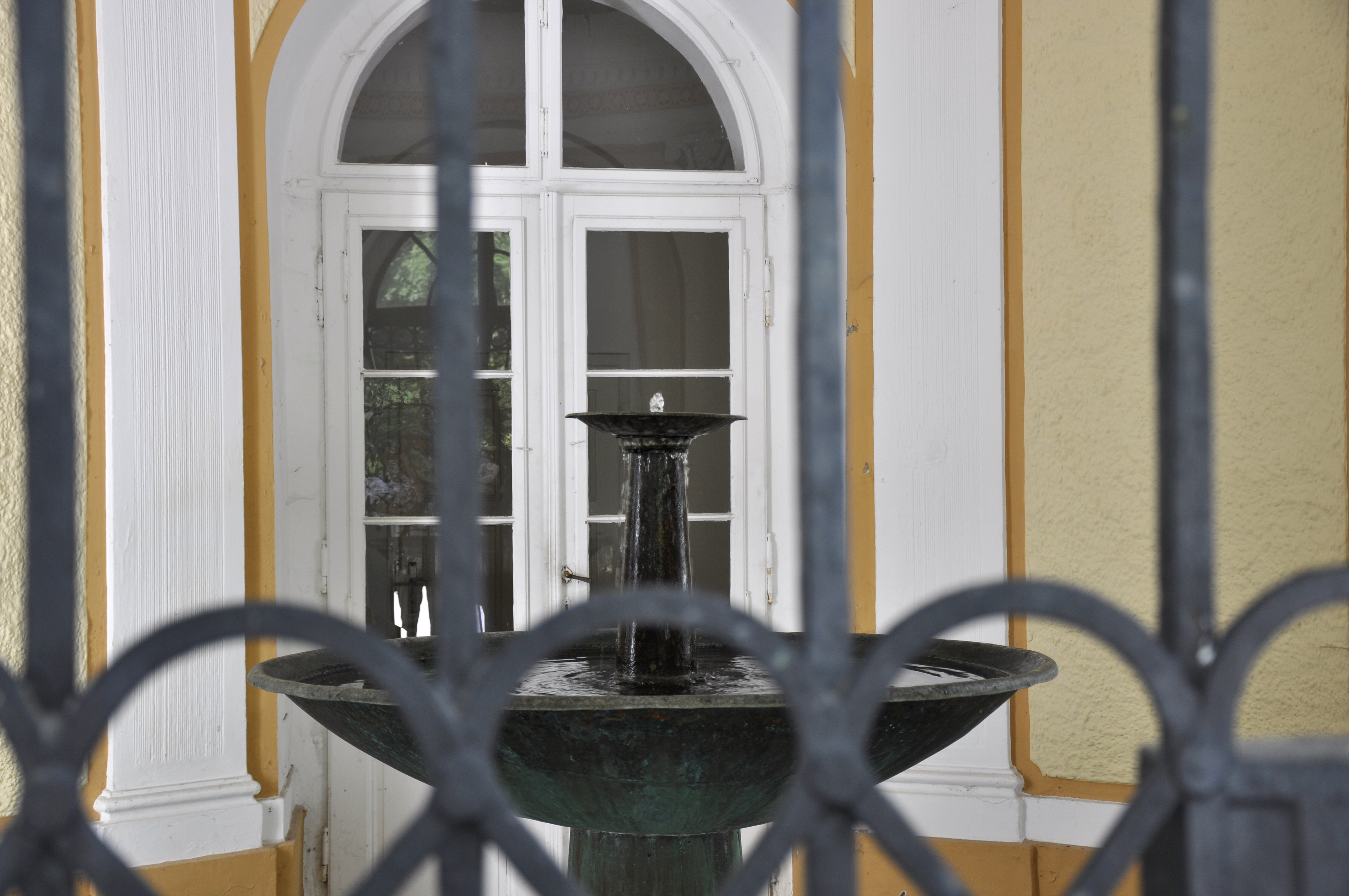 Die Tassiloquelle am Sulzbach - wenig, aber doch..